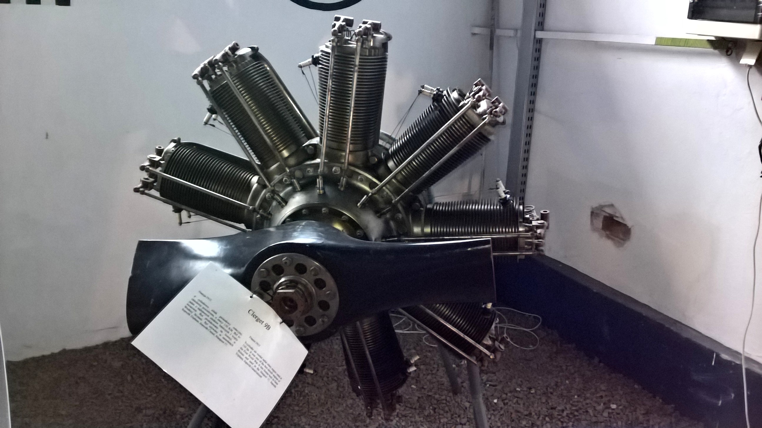 Francuski 9-cylindrowy silnik rotacyjny Clerget 9B z 1915 r. ze zbiorów Muzeum Lotnictwa Polskiego w Krakowie.